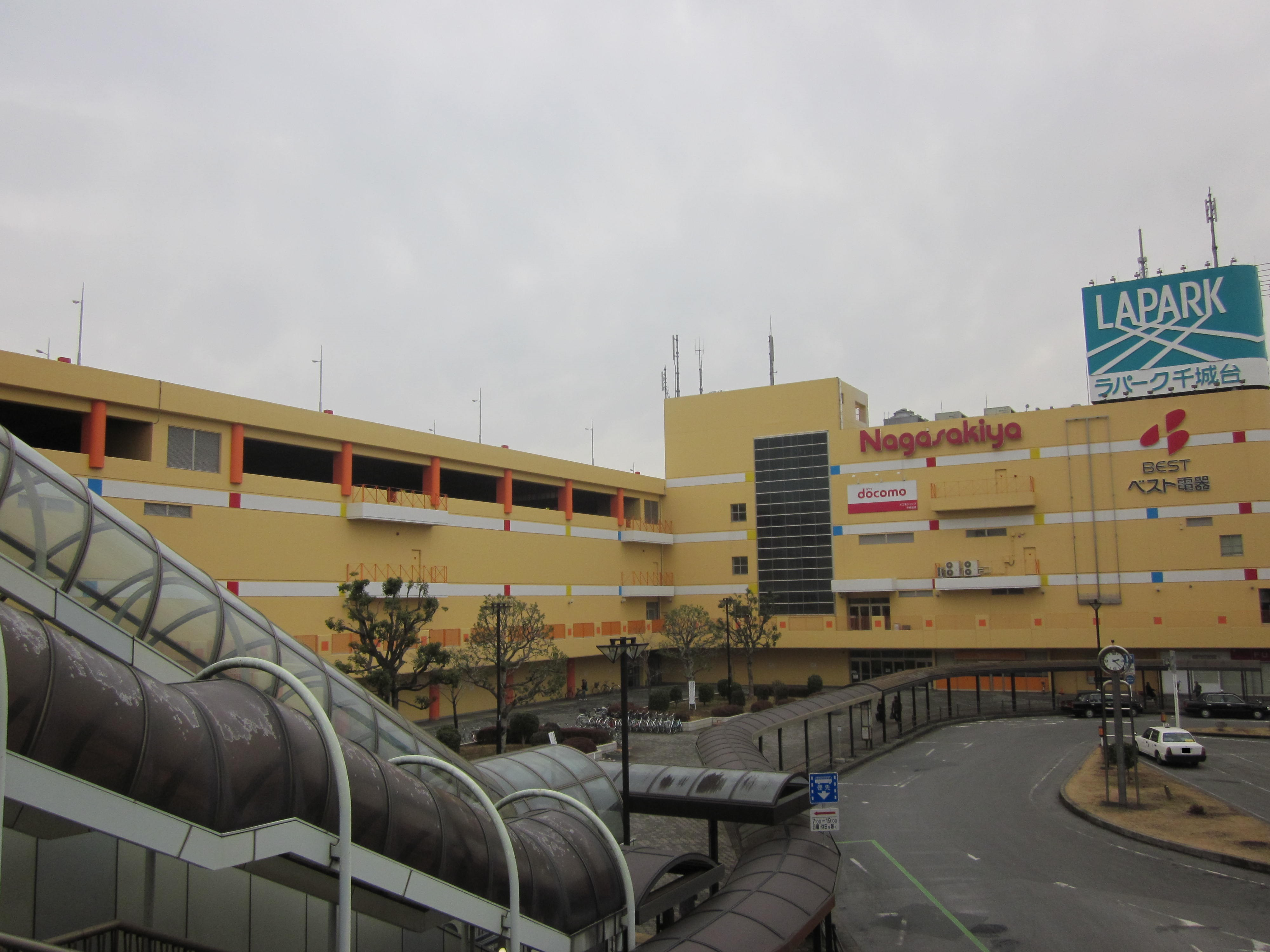 利用者:Ik06本人が撮影。この日は休館日であった。